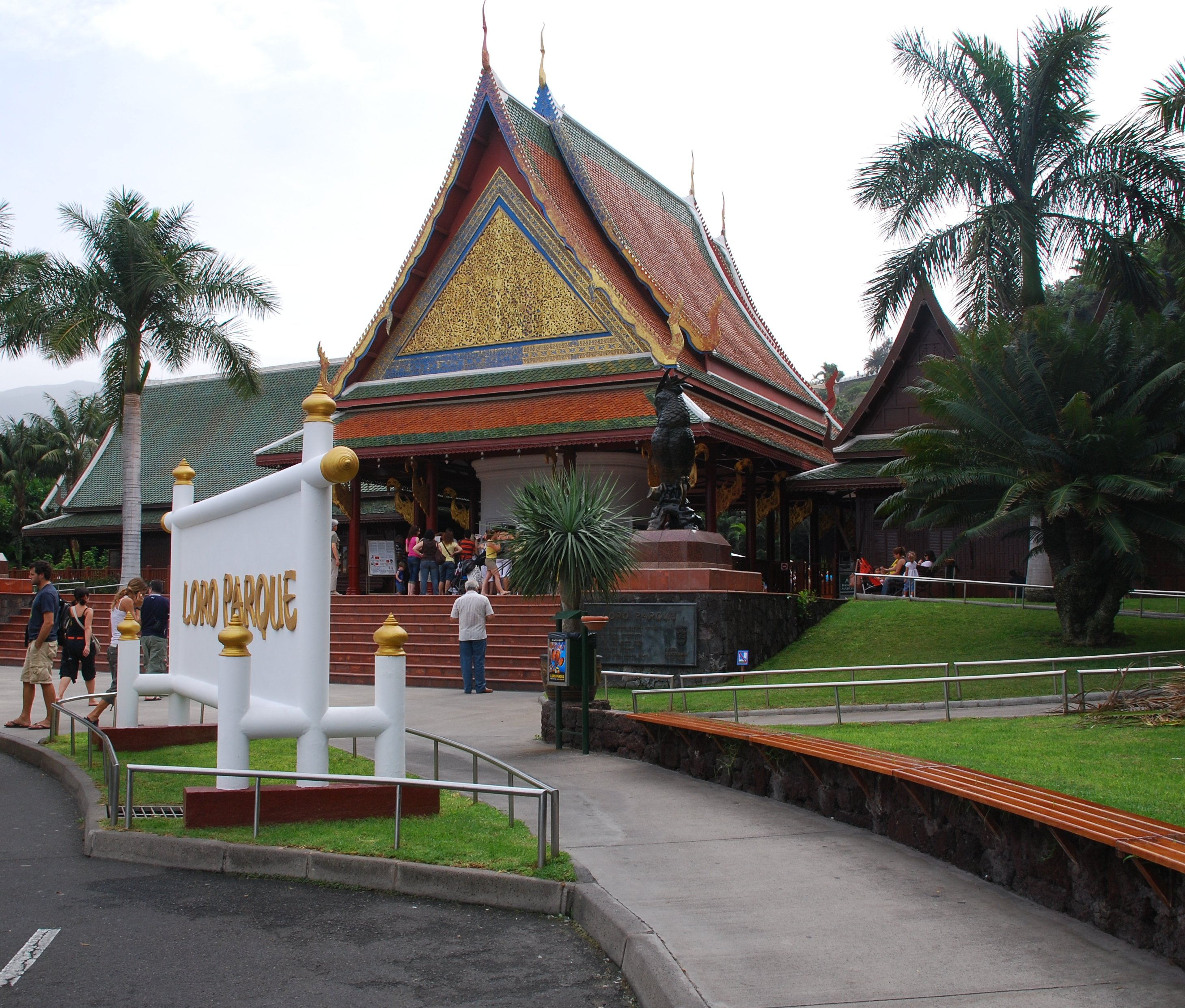 Eingang des Loro Parques